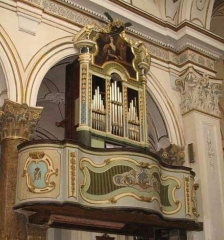 Interno della Chiesa madre di Leonforte - Organo a canne realizzato da Donato del Piano. XVIII sec.